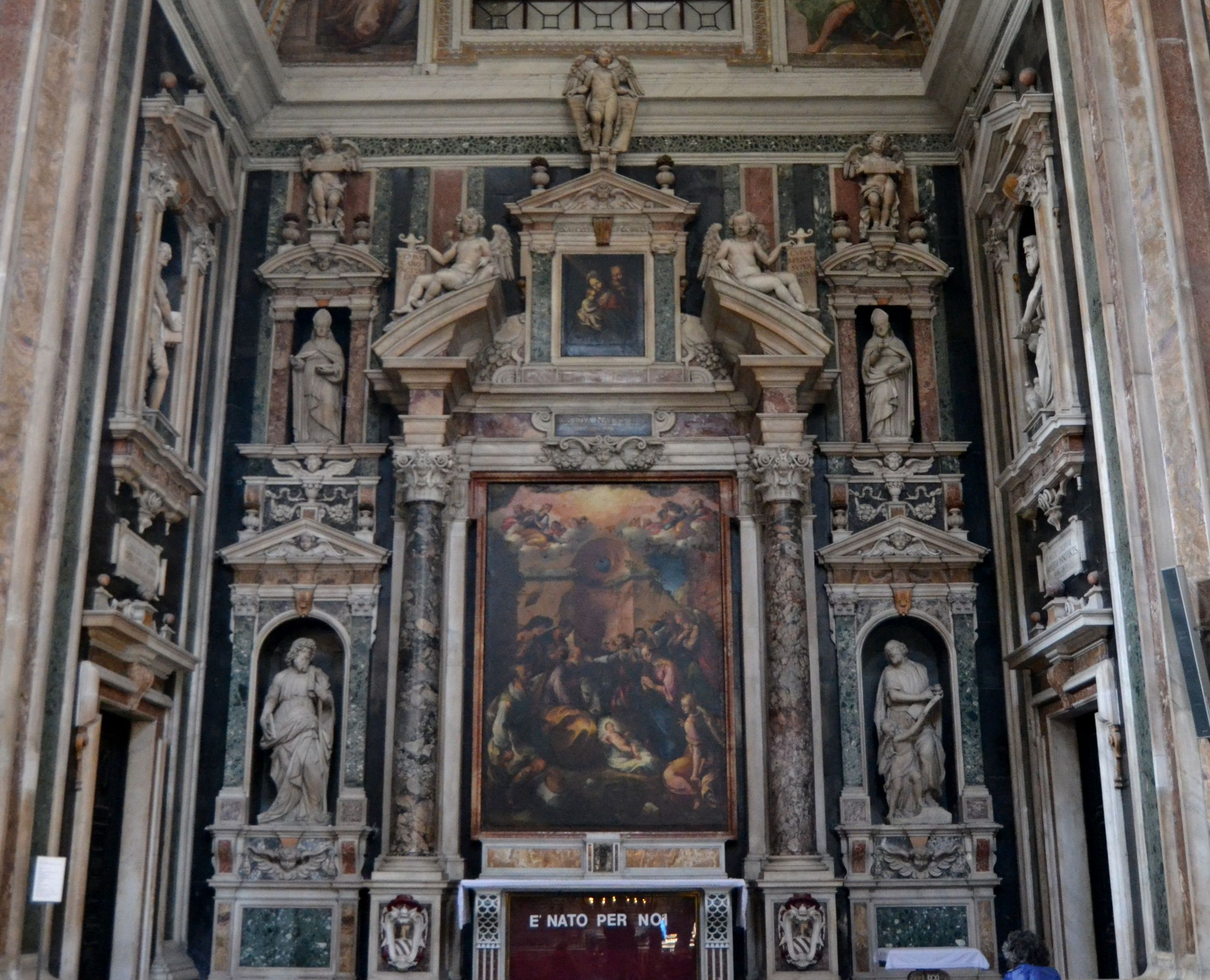 Cappella della Natività (II navata sx) della chiesa del Gesù Nuovo di Napoli